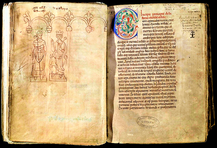 Manuscrit Liber Eliensis (image commons modifiée)